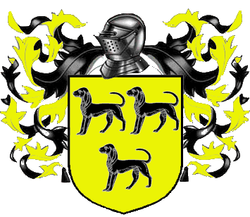 Estandarte creado con photoshop usando material libre o creado ex profeso por mi e inspirado por las obras de Canción de Hielo y Fuego.